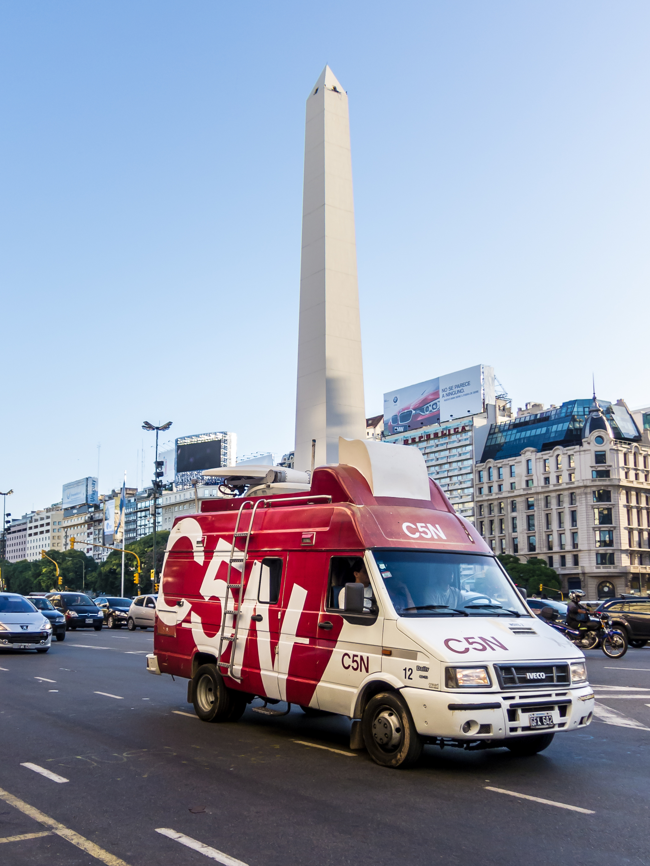 Un móvil del canal de noticias C5N transitando por la calle Carlos Pellegrini en dirección norte a su paso por el obelisco. Buenos Aires, Argentina.